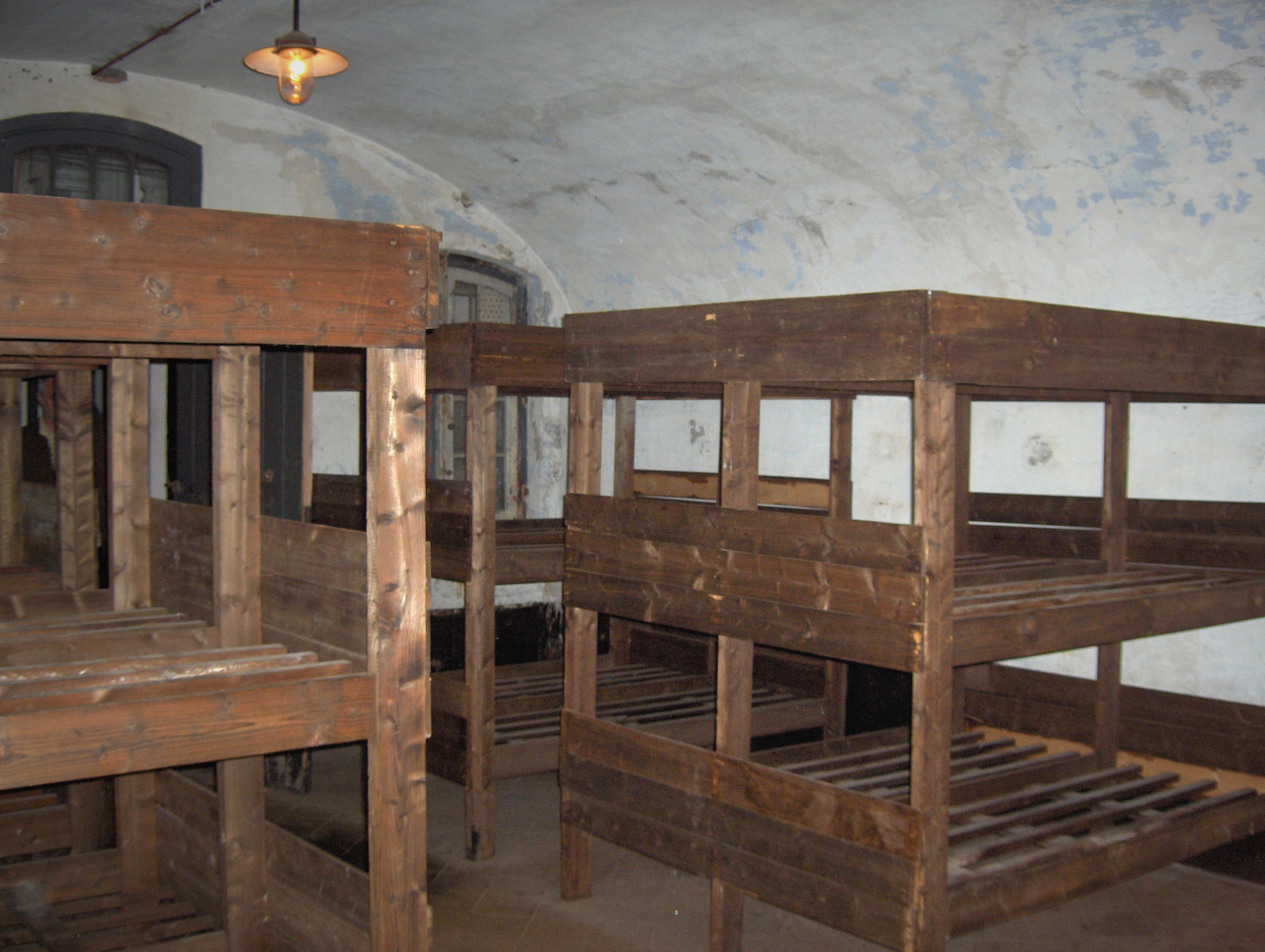 Bunkbeds for 48 prisoners in the Fort van Breendonk, Belgium